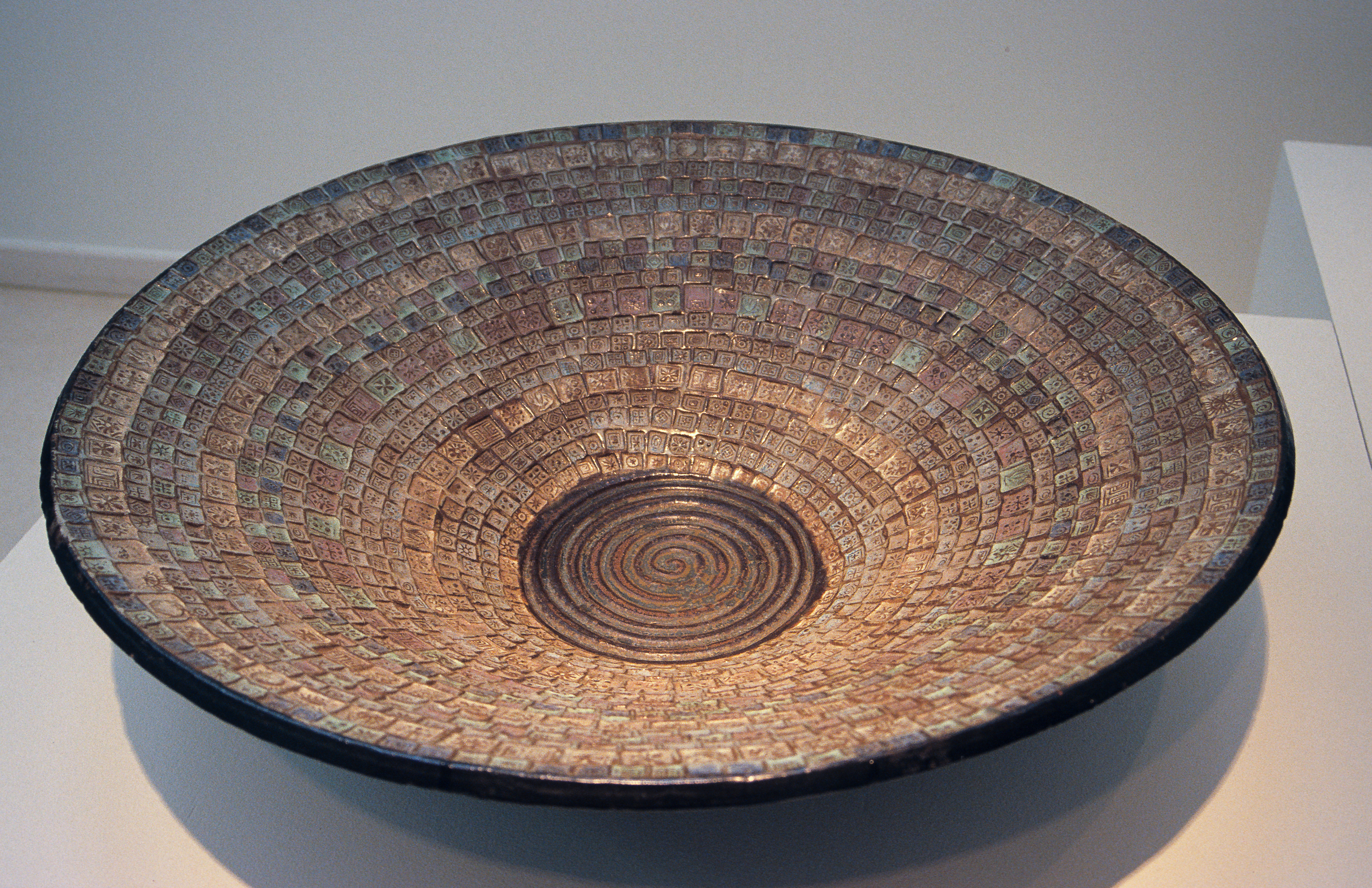 schaal